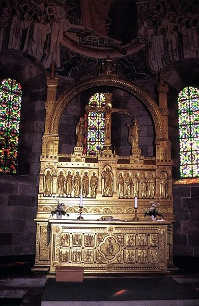 Viborg Domkirke, Alter